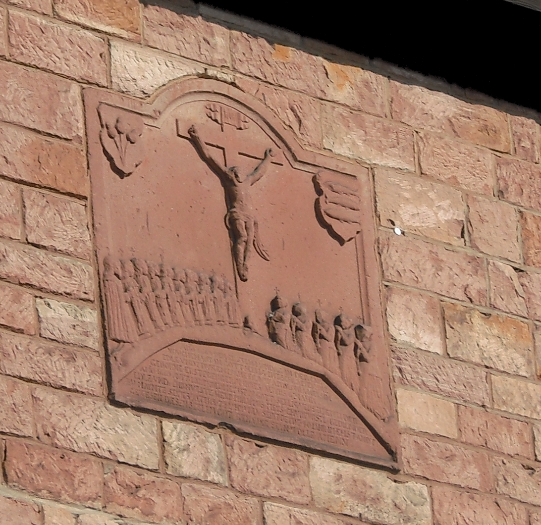 Epitaph des letzten Vogts des Gerichts Wirtheim(Biebergemünd). Es befindet sich heute an der St. Johannes Nepomuk-Kirche in Biebergemünd-Kassel